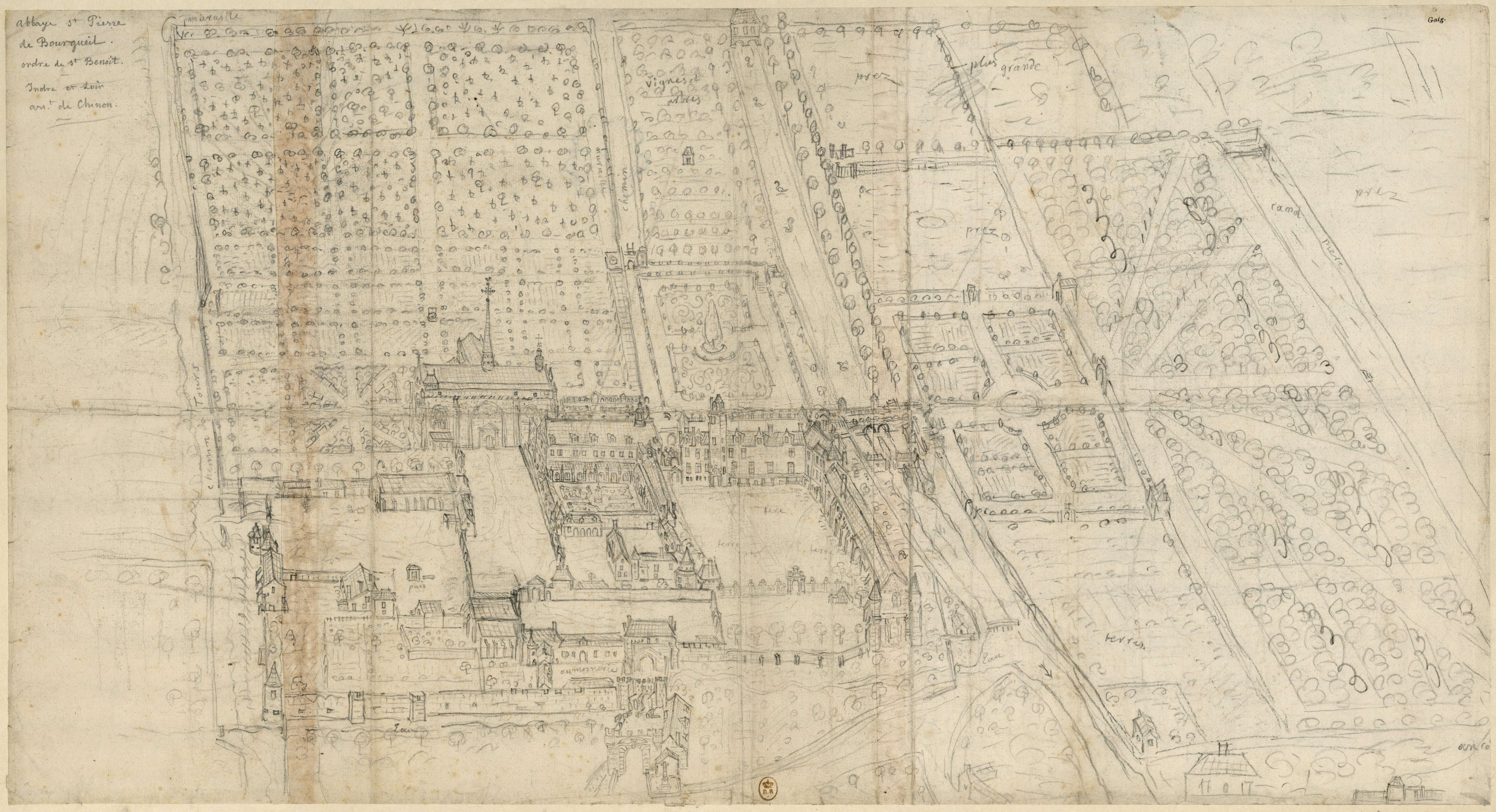 abbaye de Bourgueil Anjou Famille Le Clerc